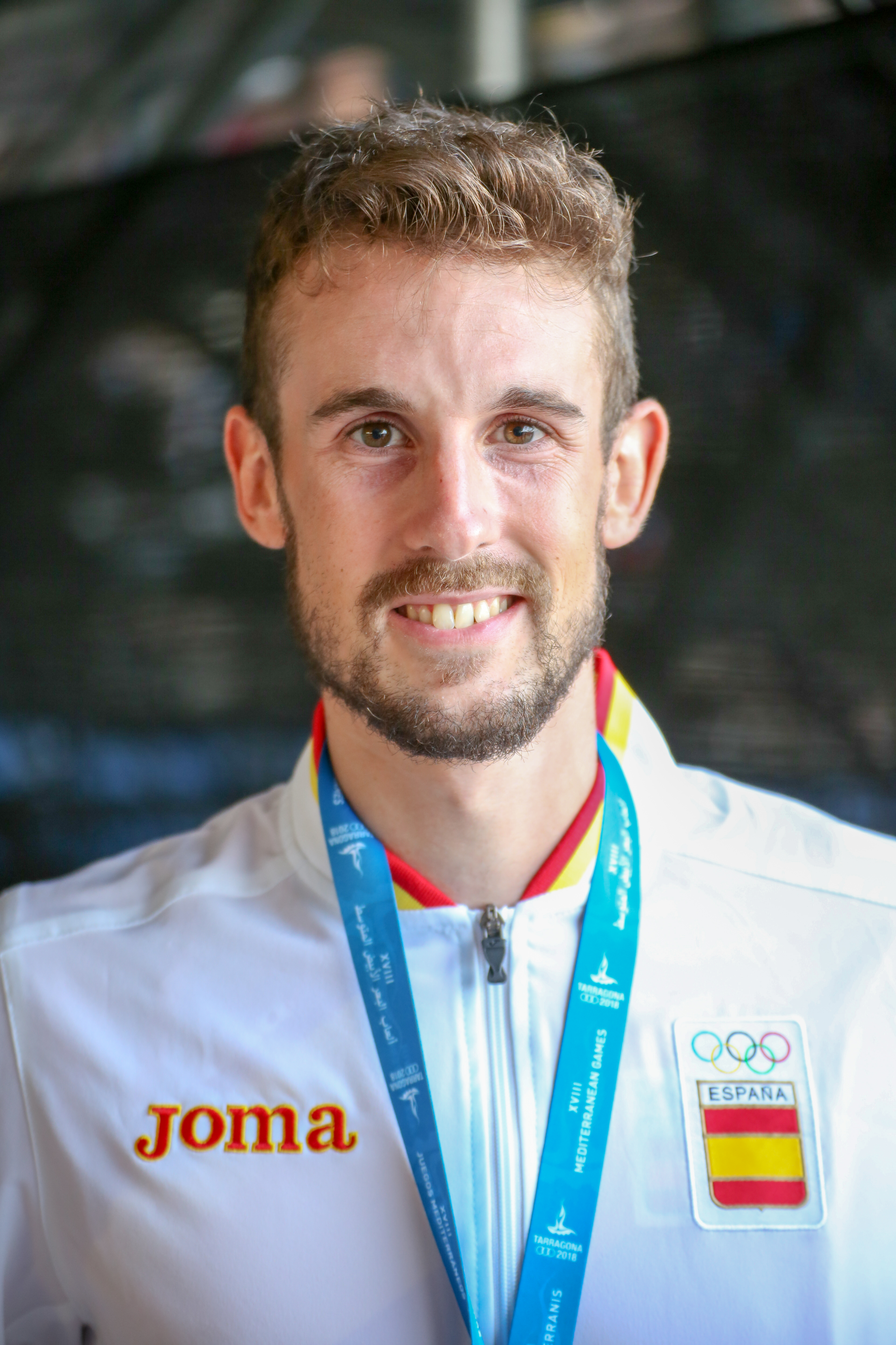 Álvaro de Arriba en los Juegos del Mediterráneo 2018